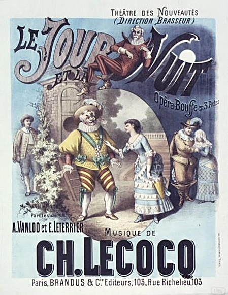 Théâtre des Nouveautés. Le Jour et la nuit, opéra bouffe en 3 actes. Paroles de MM. A. Vanloo et E. Leterrier. Musique de Ch. Lecocq. Paris, Brandus & Cie éditeurs, 103, rue Richelieu : affiche